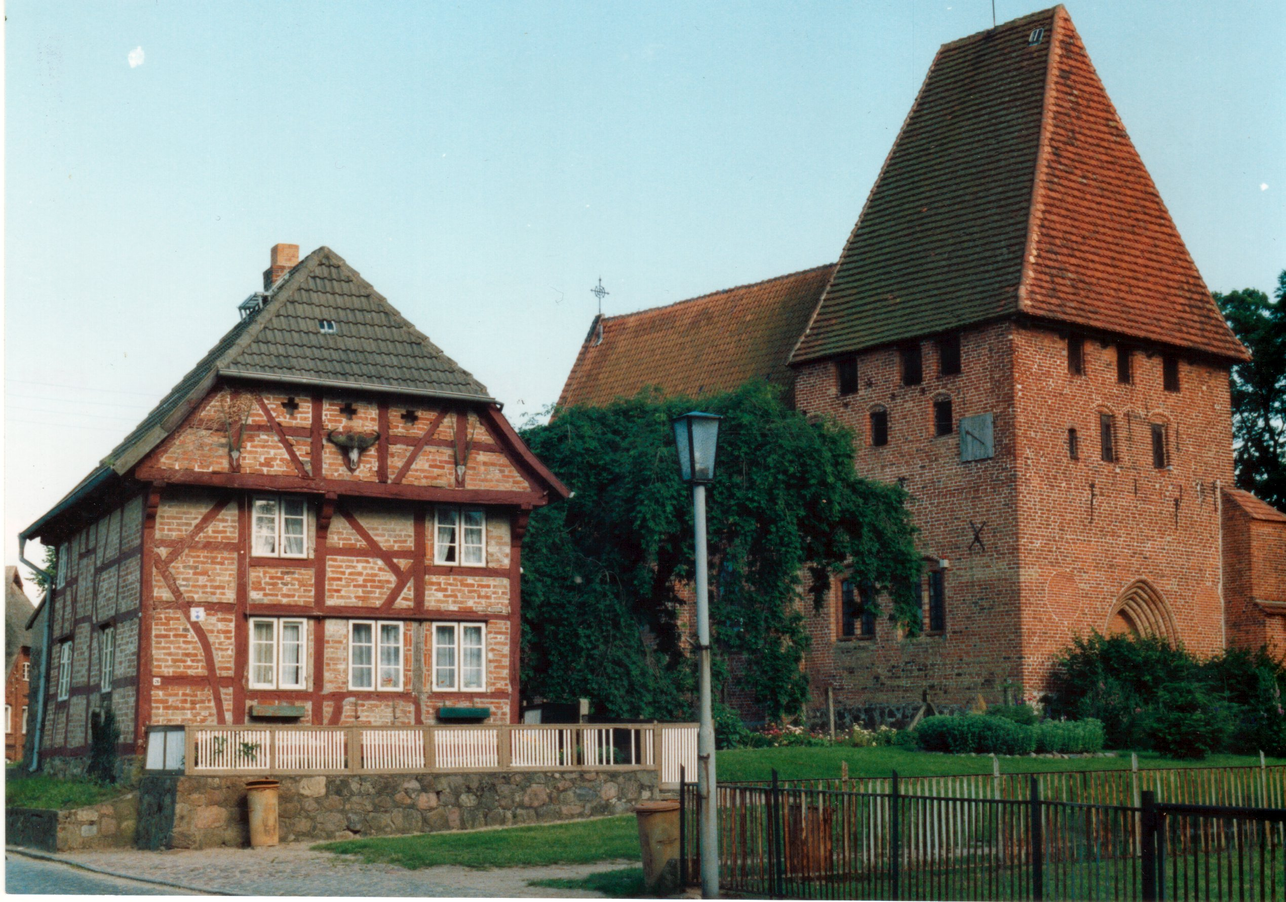 Herrnburger Dorfkirche mit Zollhaus Sonstiges: alles ok